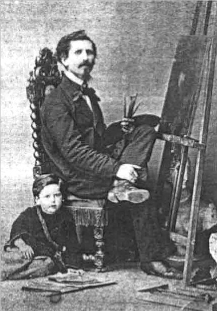 Poträt Gustav Adolf Schultze